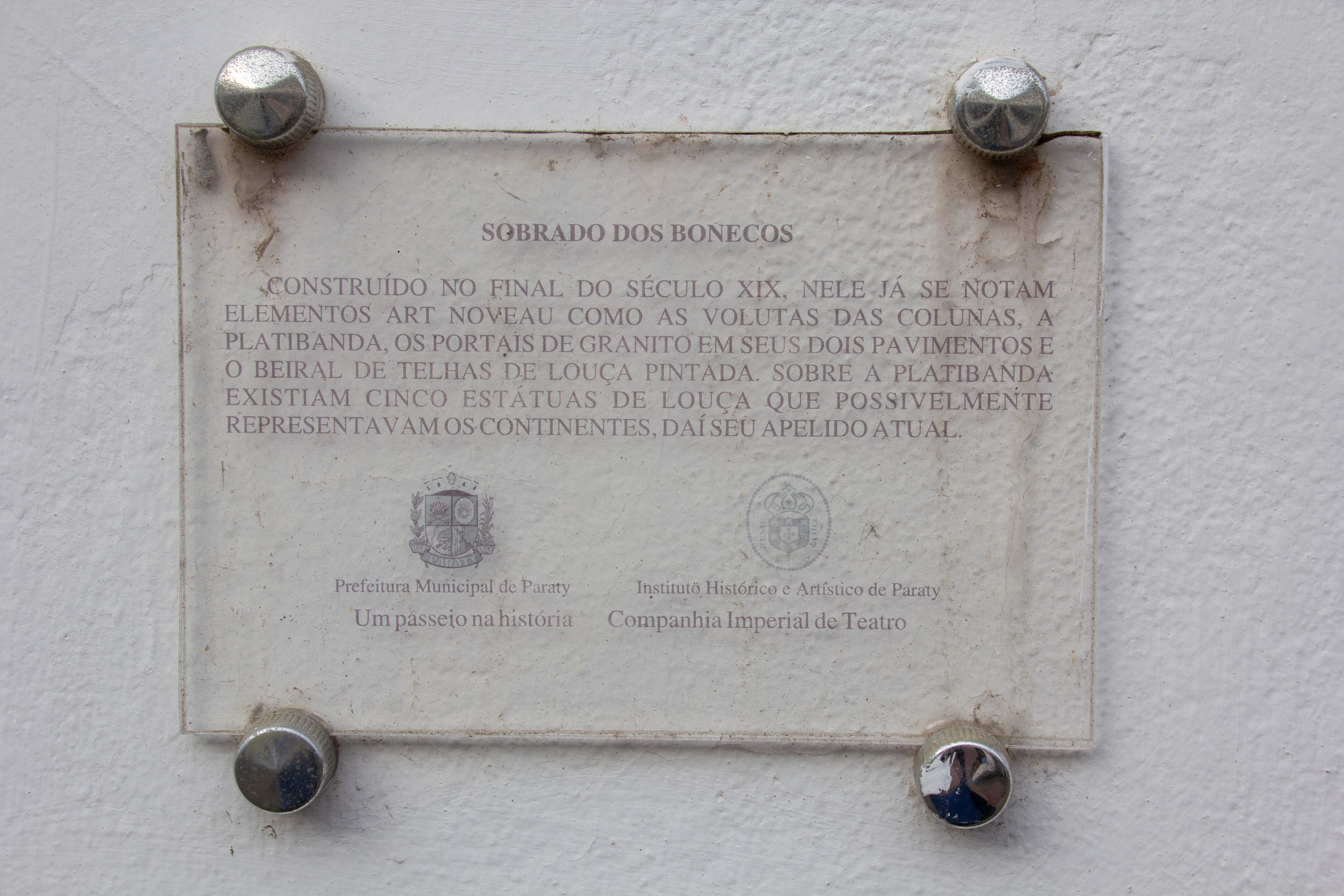 At Paraty, Brazil